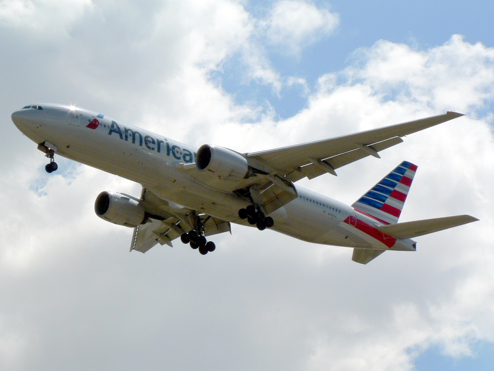 Boeing 777 (N787AL) de American Airlines aterrizando en el aeropuerto Adolfo Suárez Madrid-Barajas.